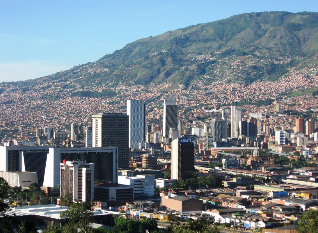 Centro de Medellín desde el Pueblito Paisa.